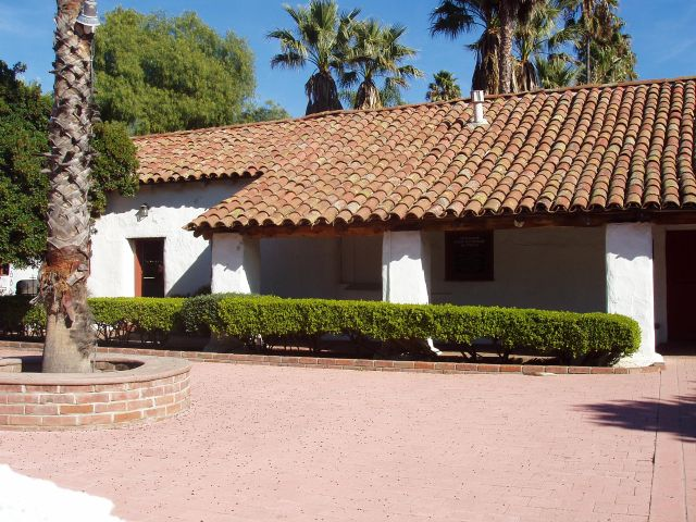 Mission San Antonio de Pala